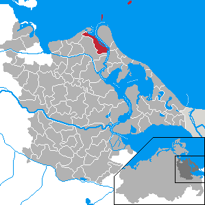 Kröslin, Landkreis Ostvorpommern, Mecklenburg-Vorpommern